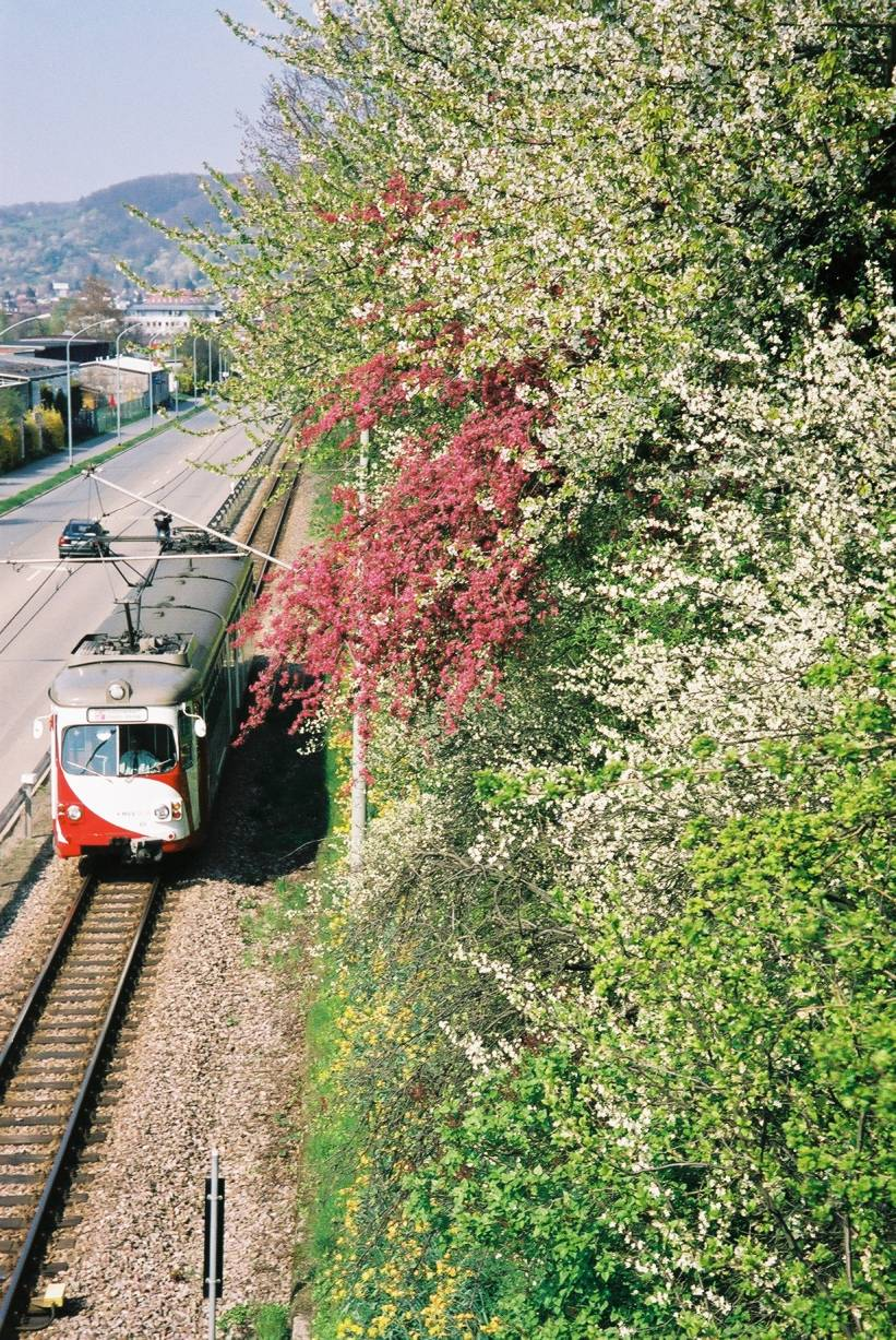 Ein GT8 der Oberrheinischen Eisenbahn-Gesellschaft (heute MVV OEG AG) im Frühling 2004 an der Bergstraße bei Weinheim.